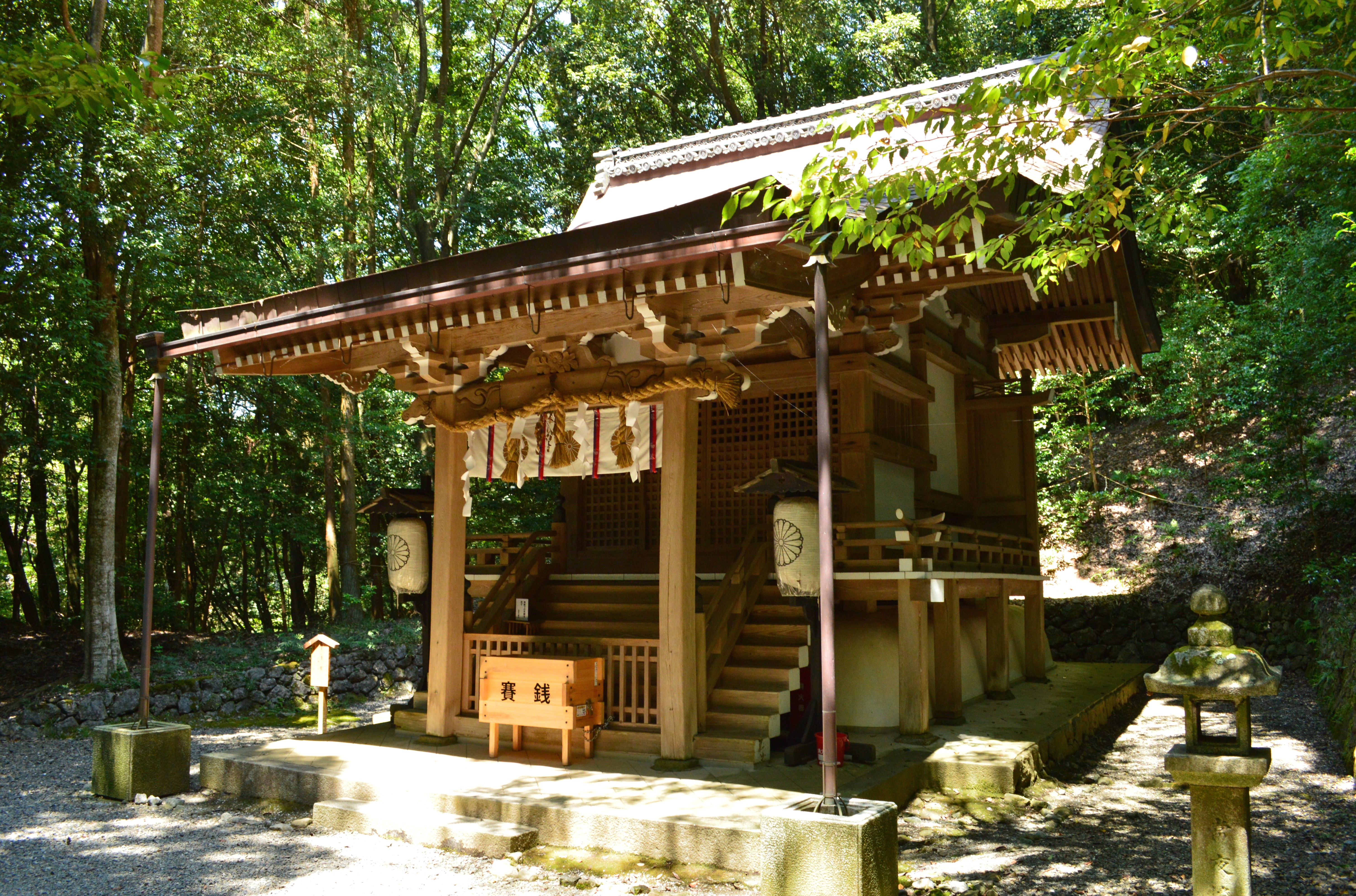 出雲大神宮 境内上ノ社